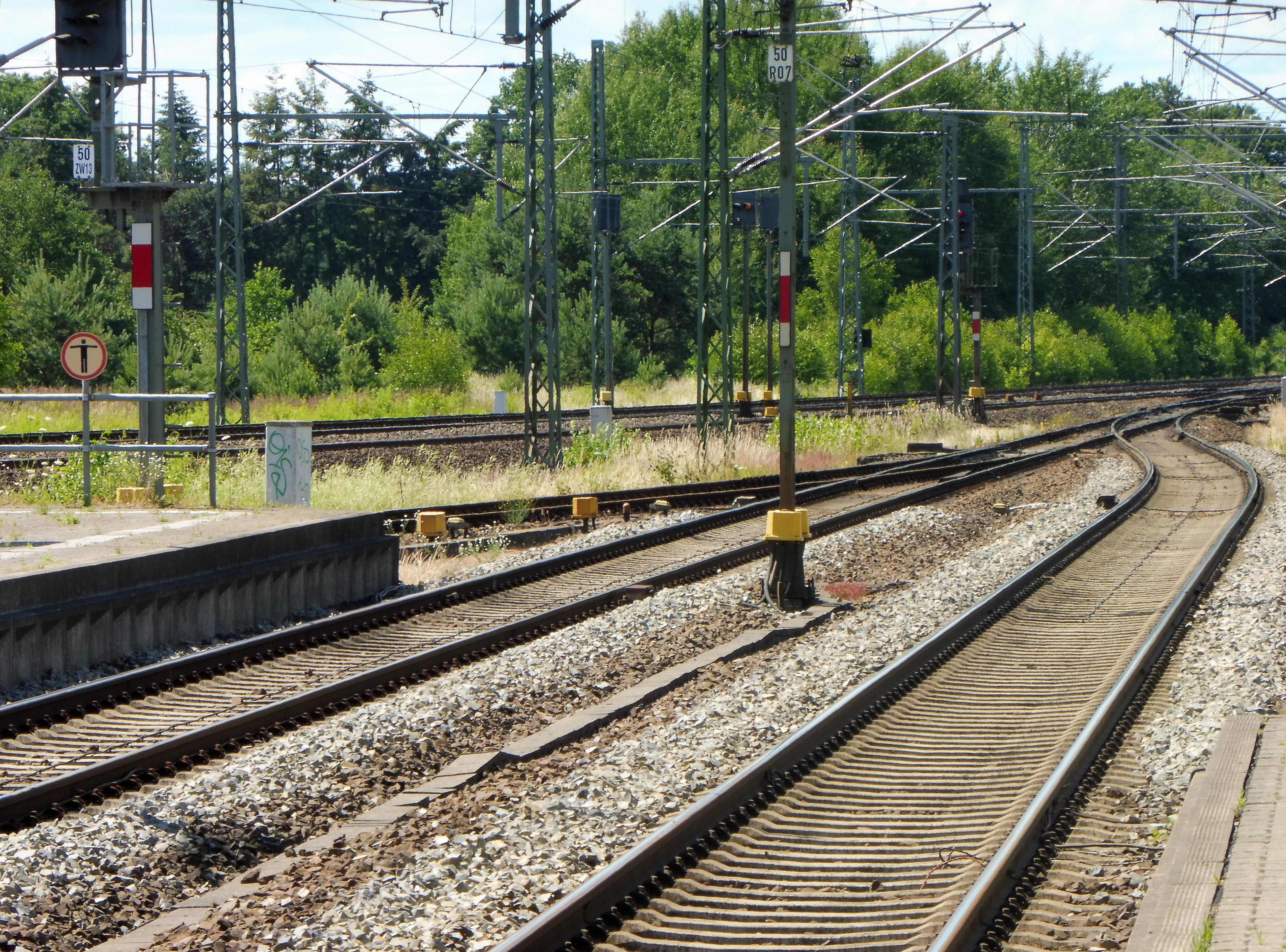 Eingleisige Einmündung des Schweriner Gleispaars in die Berlin-Hamburger Strecke beim Bahnhof Hagenow Land